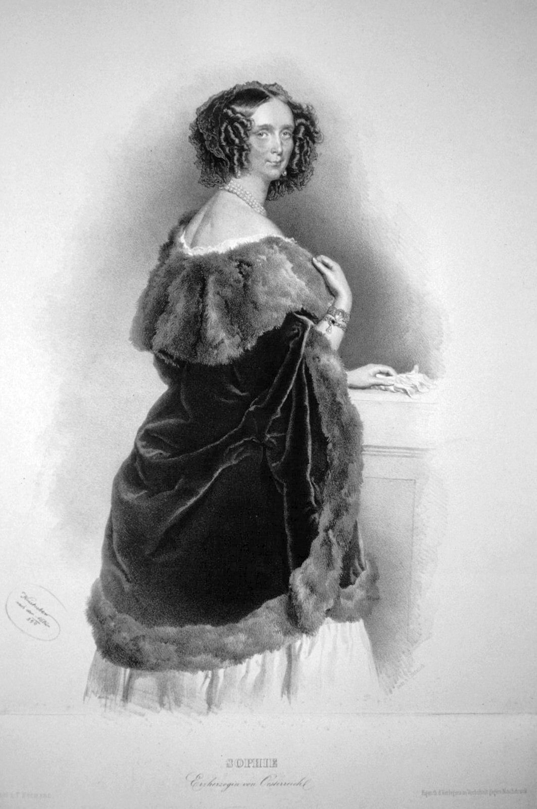 Sophie Friederike von Bayern, Erzherzogin von Österreich, Mutter des Kaisers Franz Josef I.